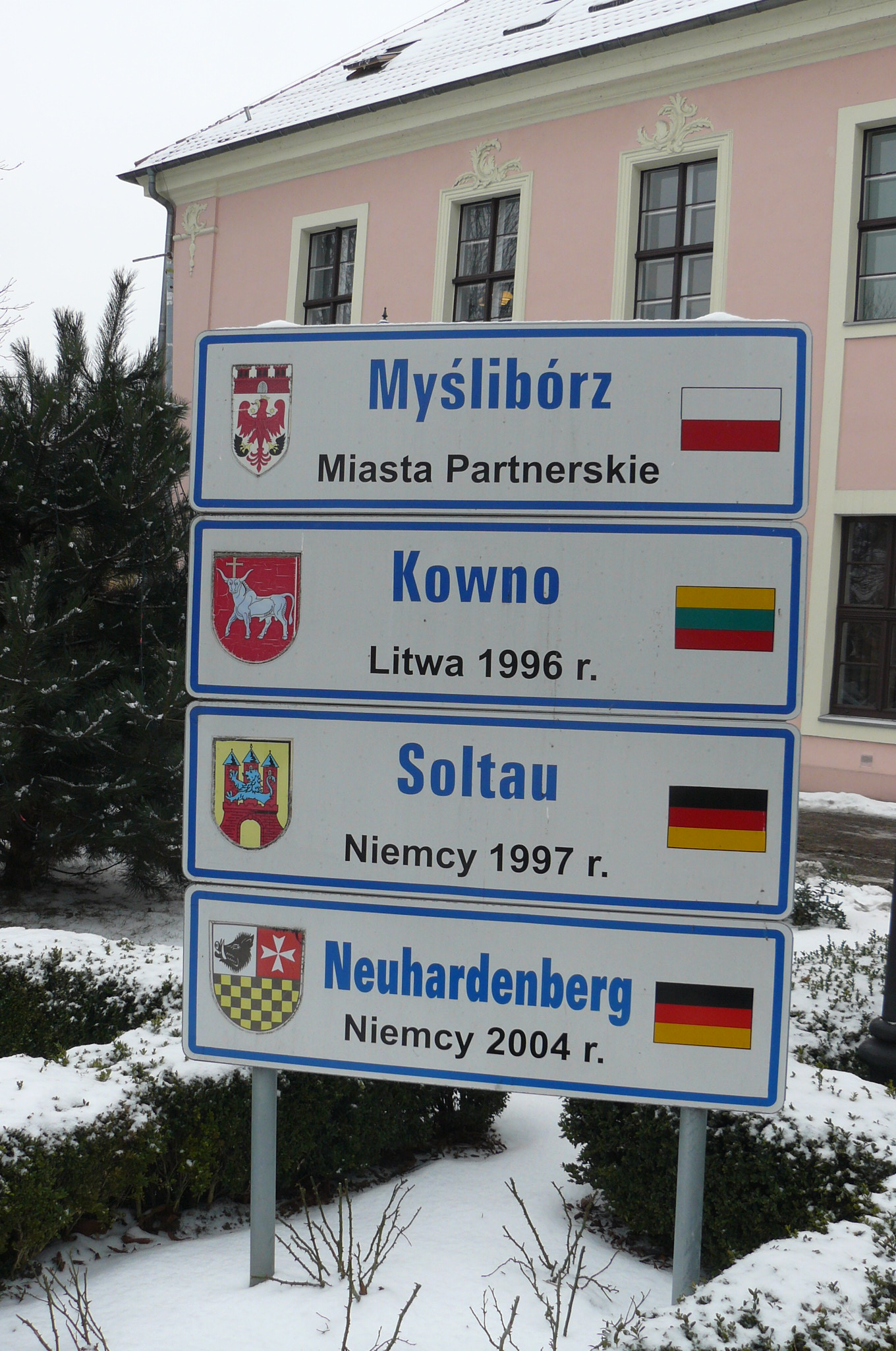 Ratusz w Myśliborzu.